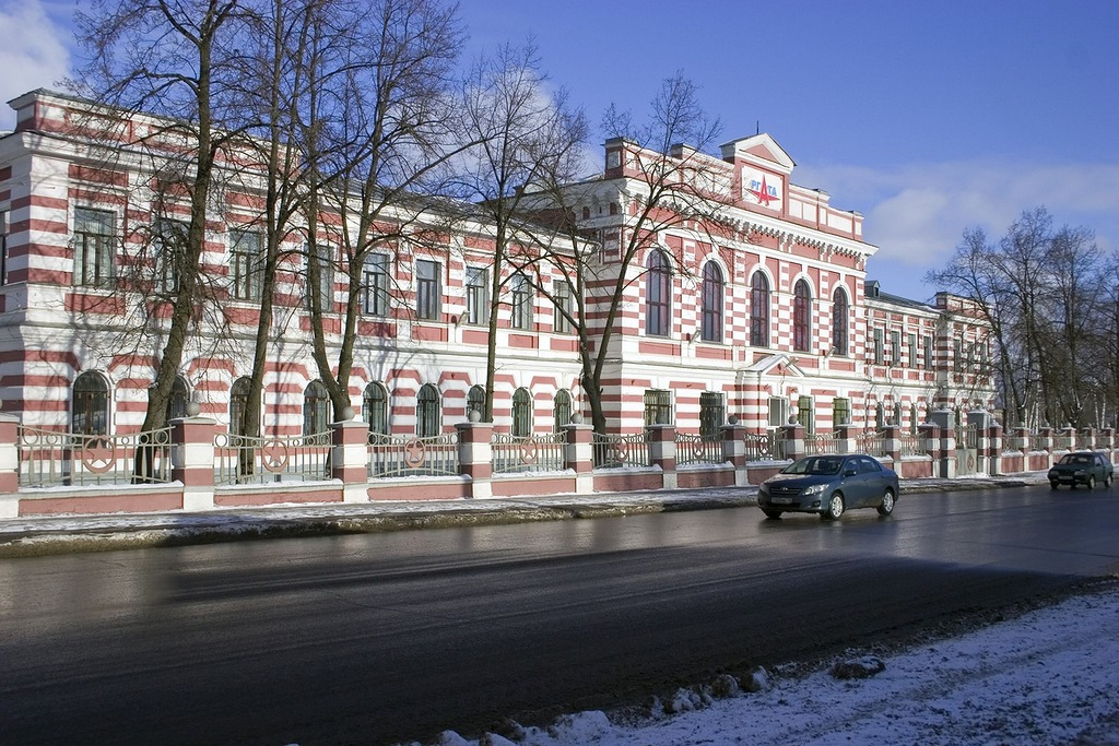 Здание ремесленного училища им. Комарова